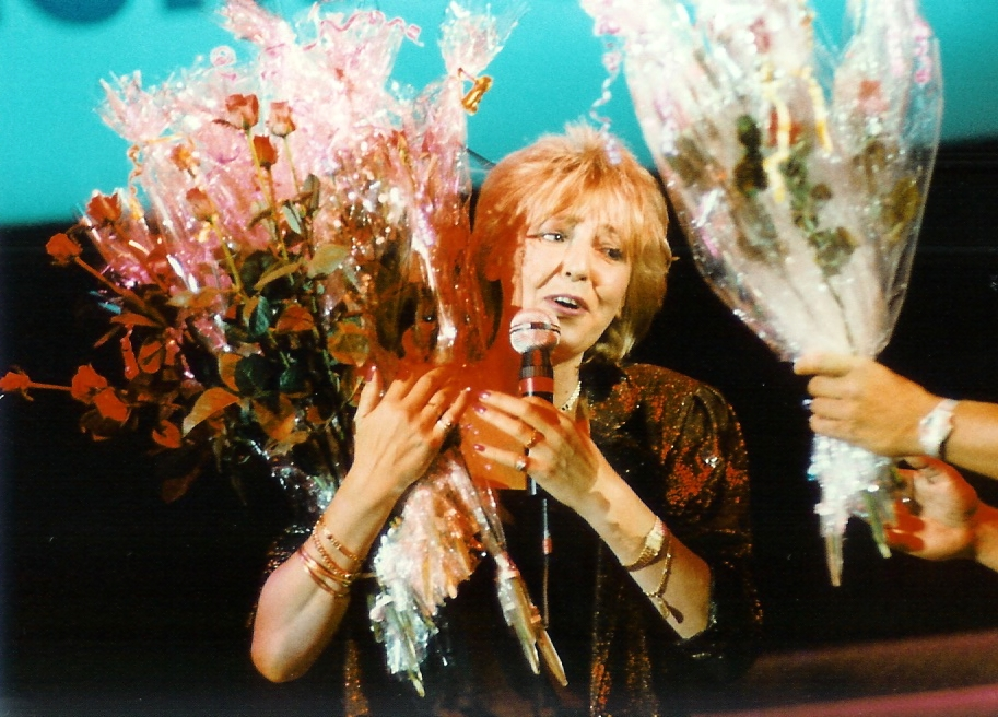 Hanne Haller, German Schlager-singer and songwriter